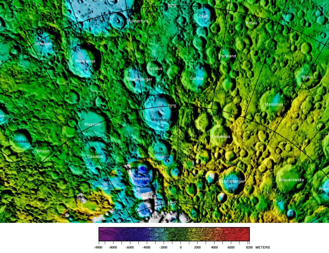 Cráter lunar Moretus. Localización. (Imagen USGS)